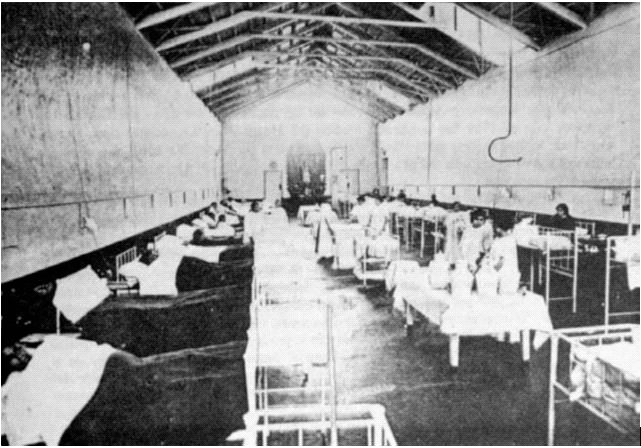 Sala del Hospital Militar San Bartolomé, Lima, Perú, siglo XIX. Cuando tenía su sede en Barrio Altos.